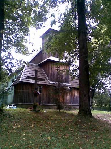 Rakowa - cerkiew greckokatolicka, przejściowo kościół rzymskokatolicki, obecnie opuszczona